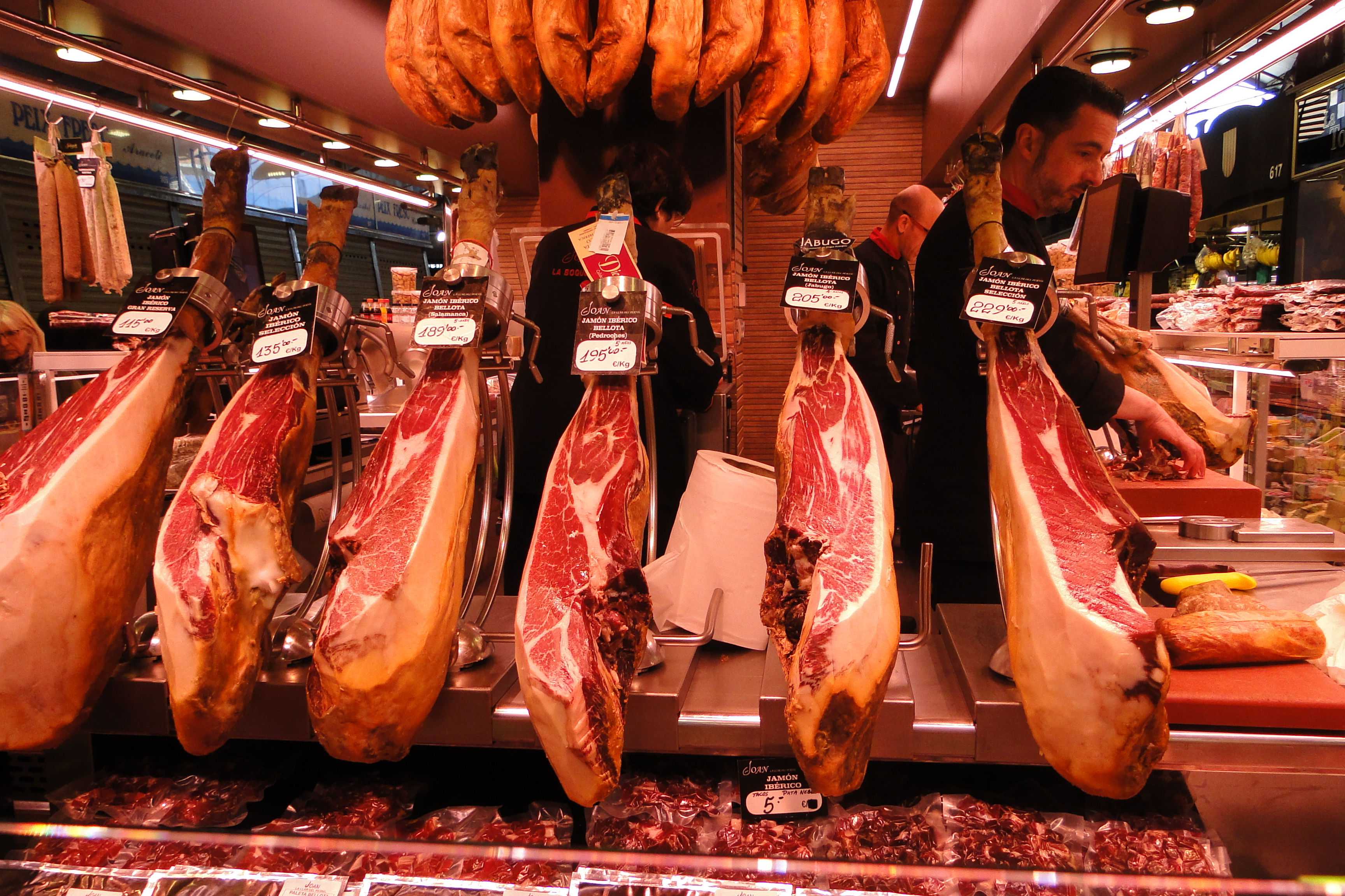 Prosciutto crudo spagnolo noto come "ibérico" in uno stand de La Boqueria, mercato coperto di Barcellona (Spagna)